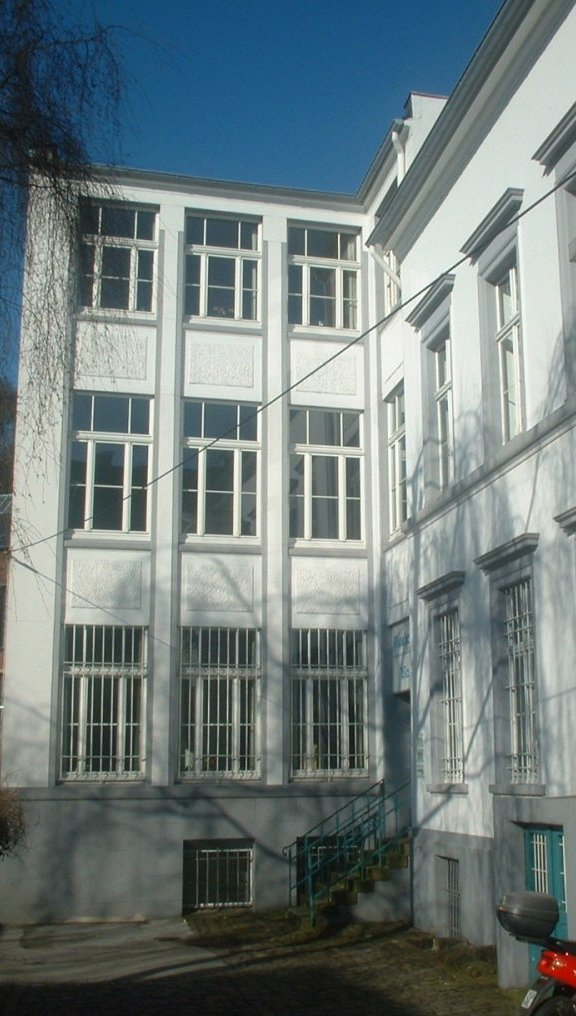 Anbau an das Konorhaus - Bandfabrik Wilhlem BÃ¼sgen